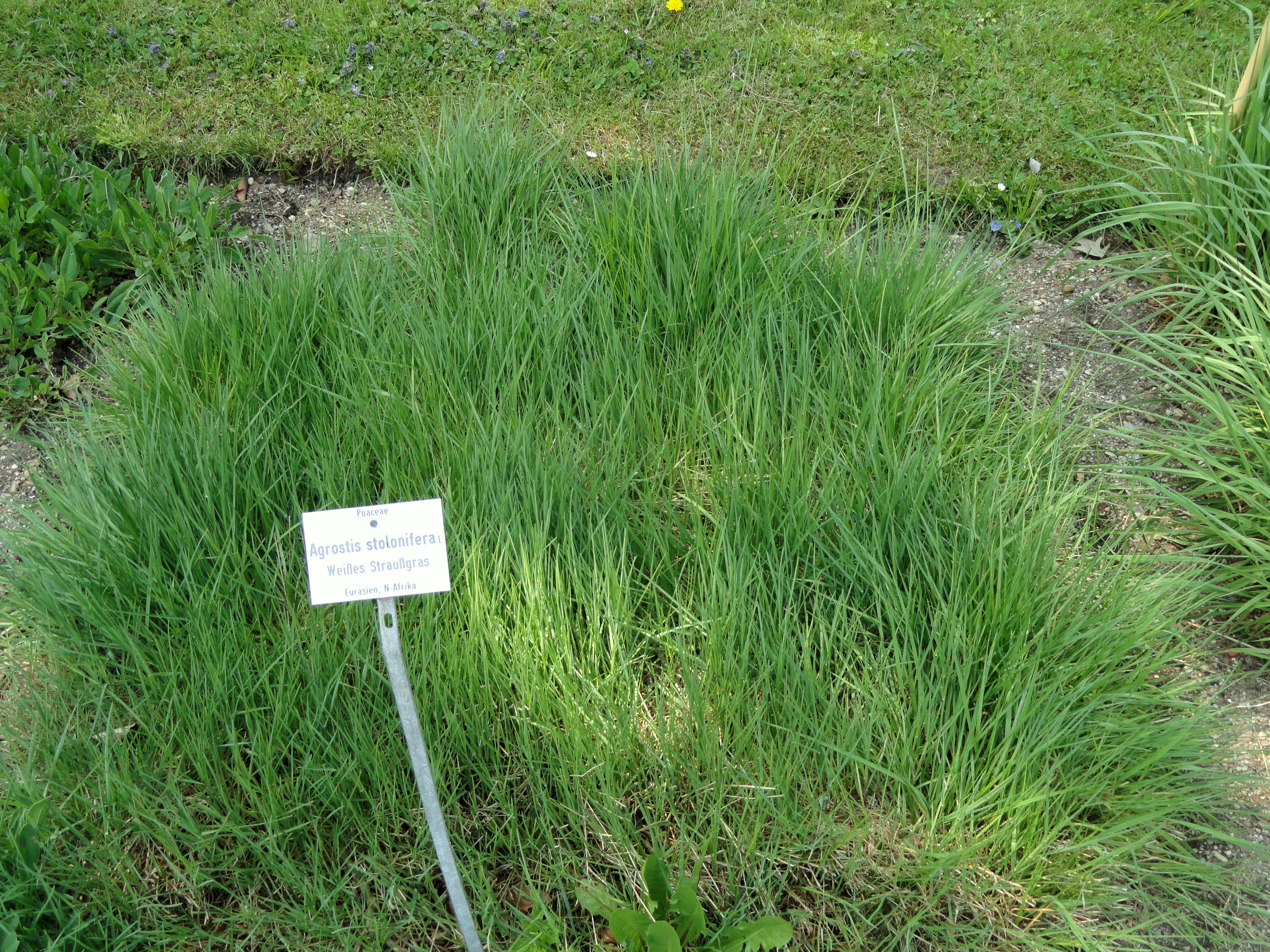 Agrostis stolonifera specimen in the Botanischer Garten München-Nymphenburg, Munich, Germany.